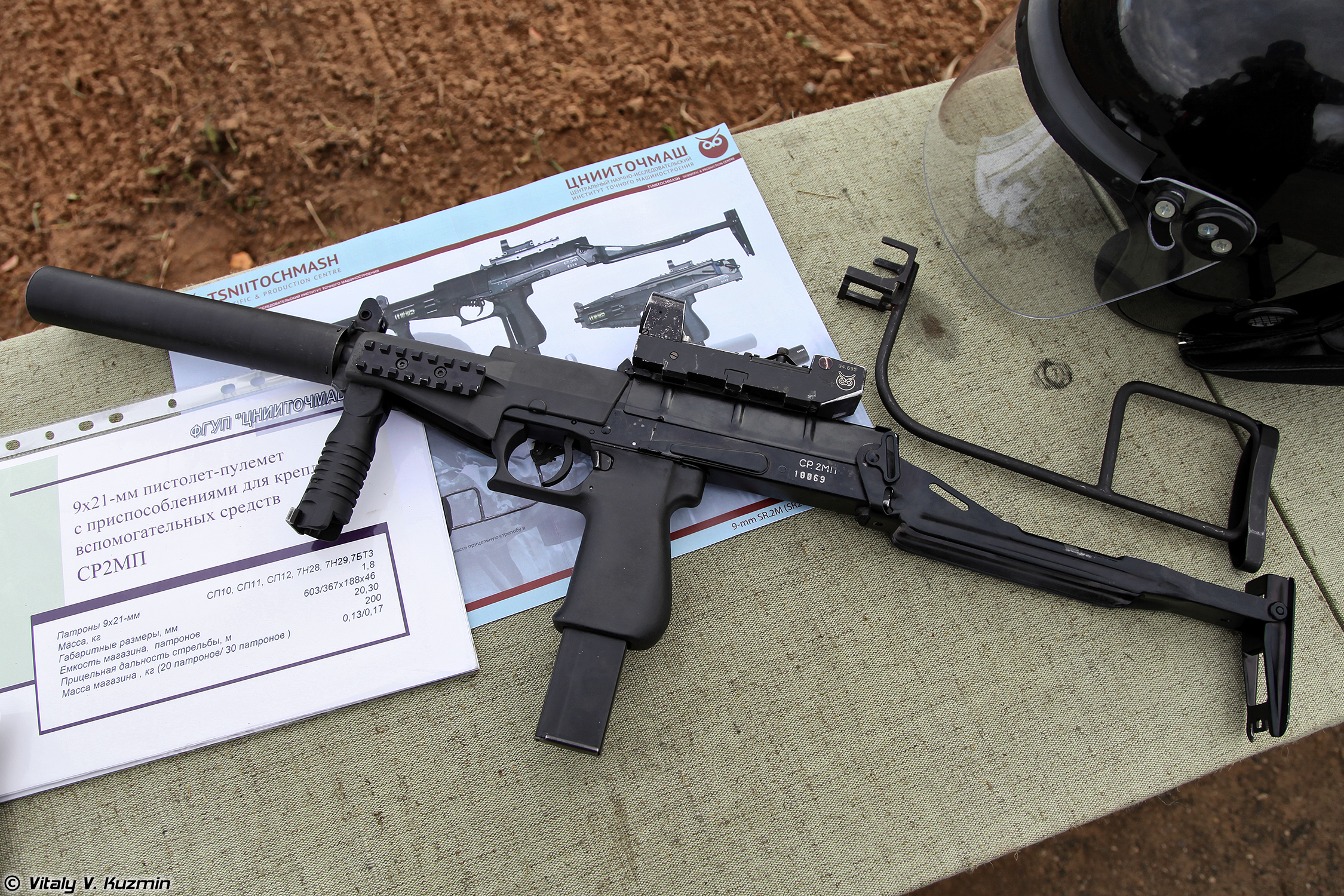 Пистолет-пулемет СР2МП (SR2MP submachine gun)